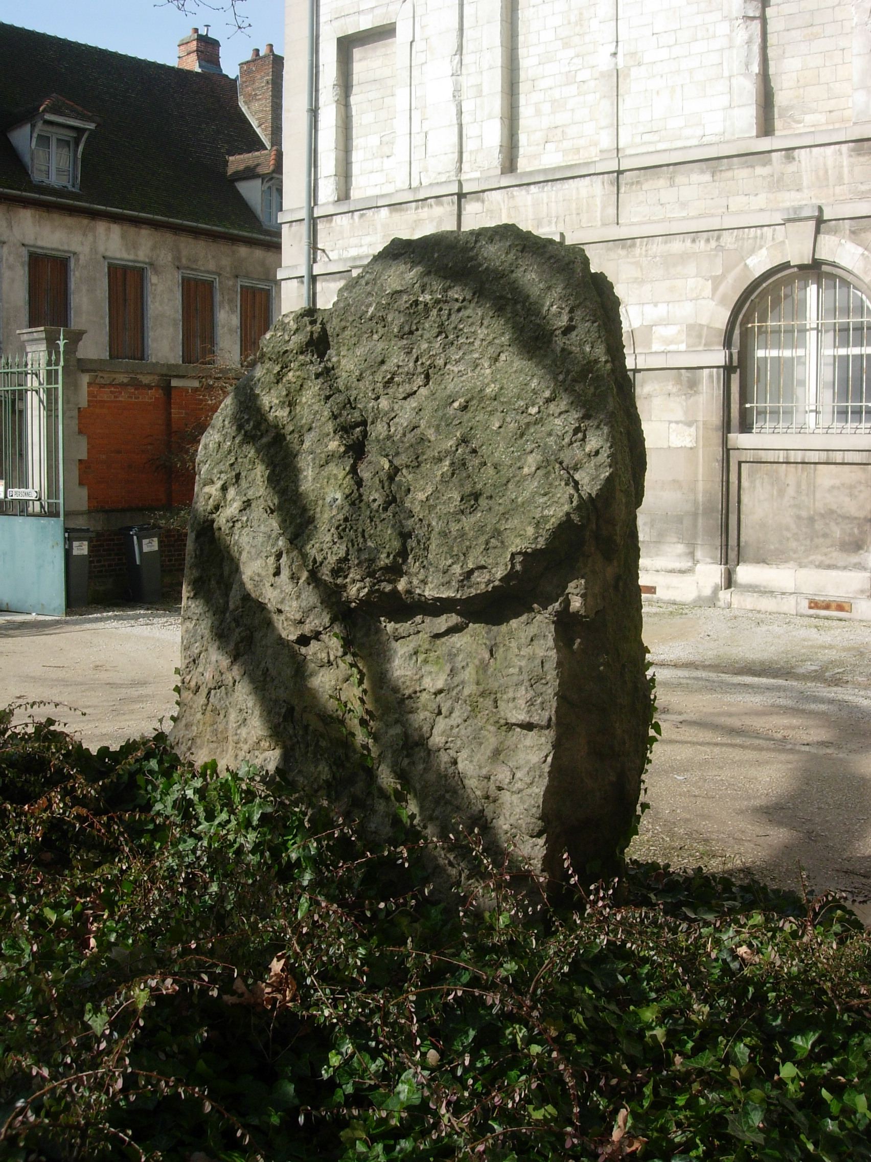 Menhir dit la Grande Borne (Barbuise Courtavant) déplacé au musée de Troyes